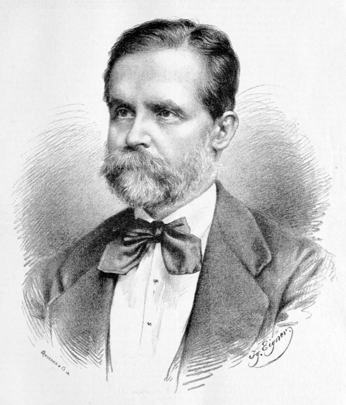 Alois Czedik Freiherr von Bründelsberg und Eysenberg (1830–1924), Austrian officer, teacher and politician Alois Czedik Freiherr von Bründelsberg, Präsident der Staatsbahnen